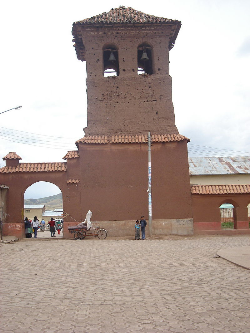 Torre Guardián Mudo. La torre de Macari fue construida en la época colonial como monumento a la nueva religión impuesta por los colonizadores